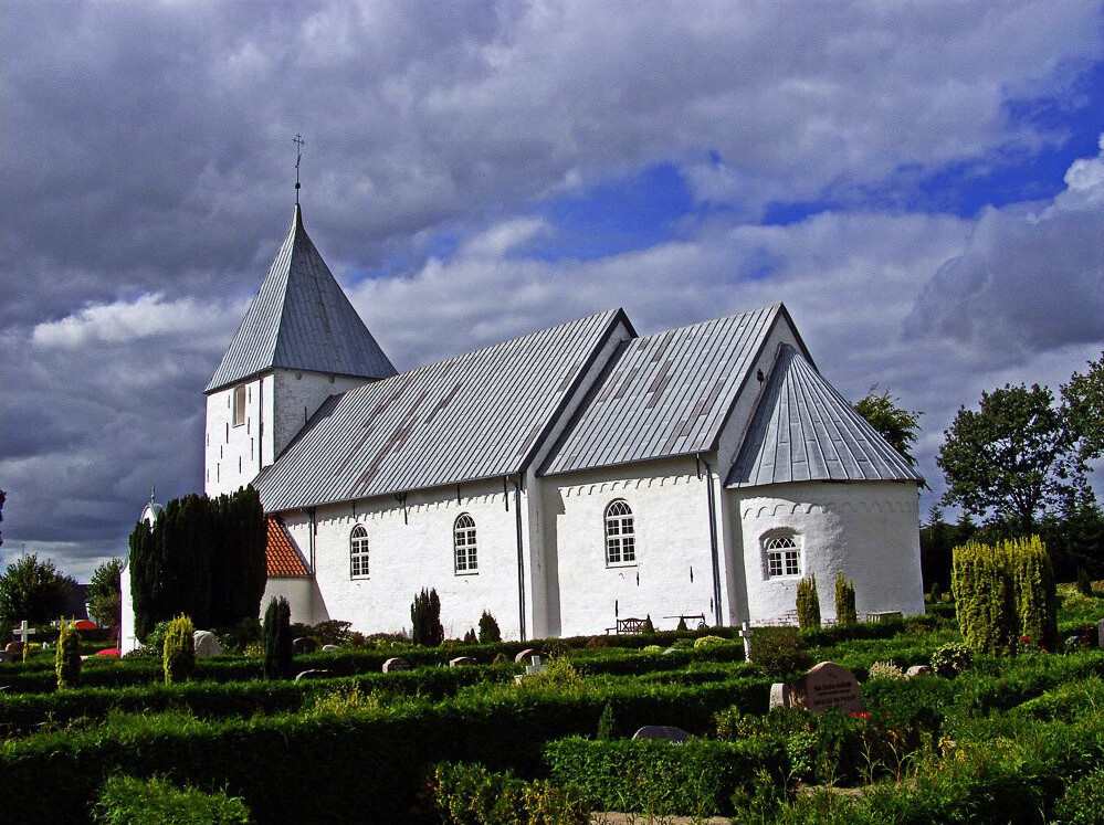 fra sydøst